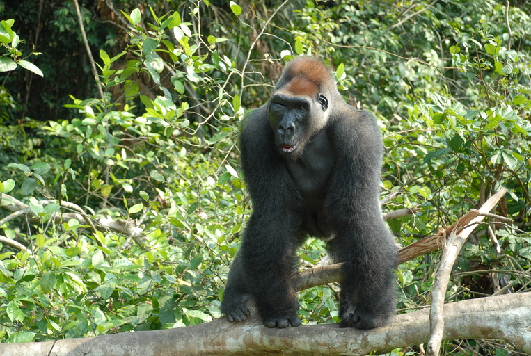 Gorilla gorilla gorilla, Congo